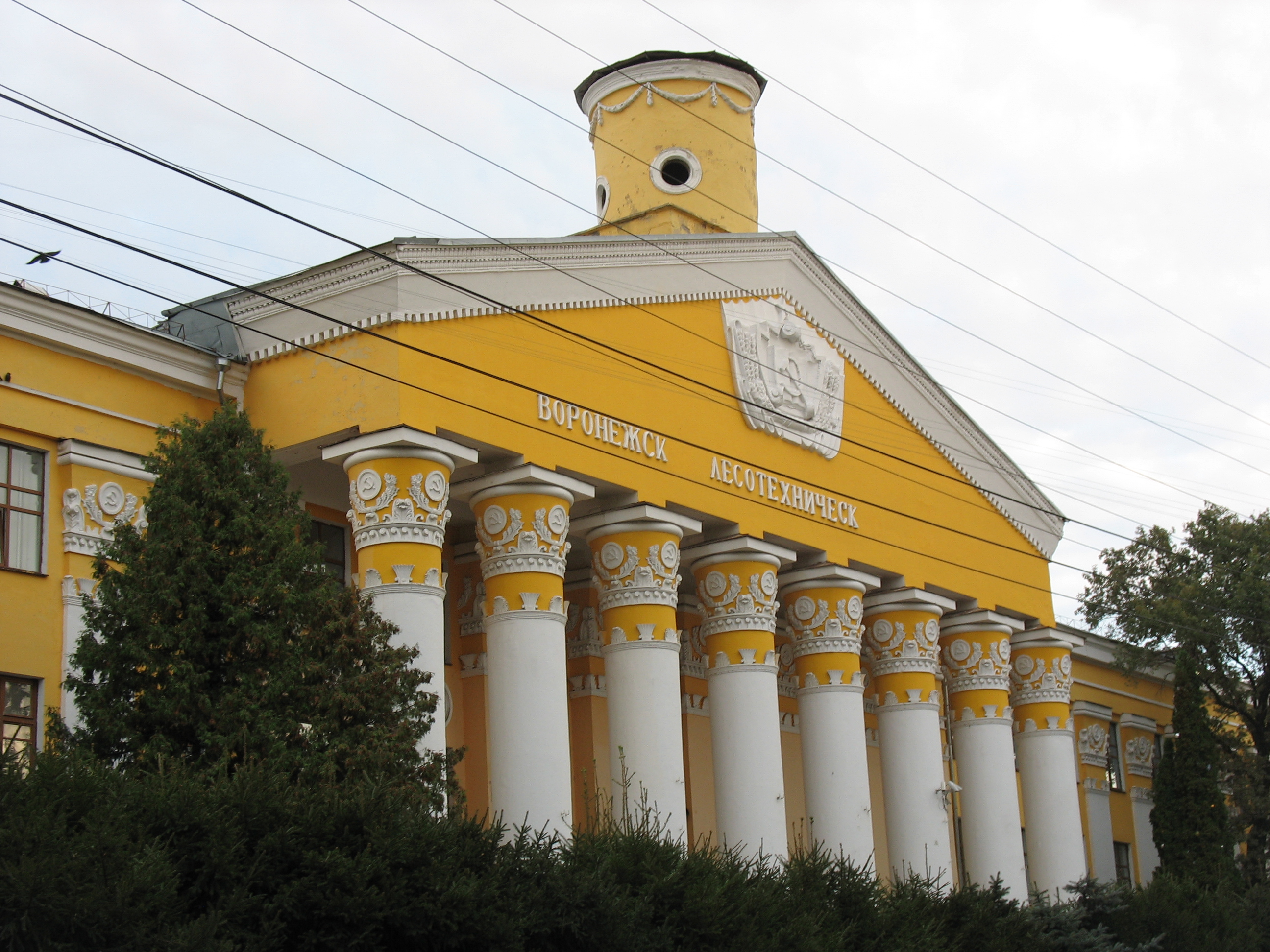 Здание лесотехнического института: улица Тимирязева, 8, Воронеж, Воронежская область